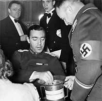 Gustaf Adolf ger bidrag till den tyska vinterhjälpen i Berlin 1939.